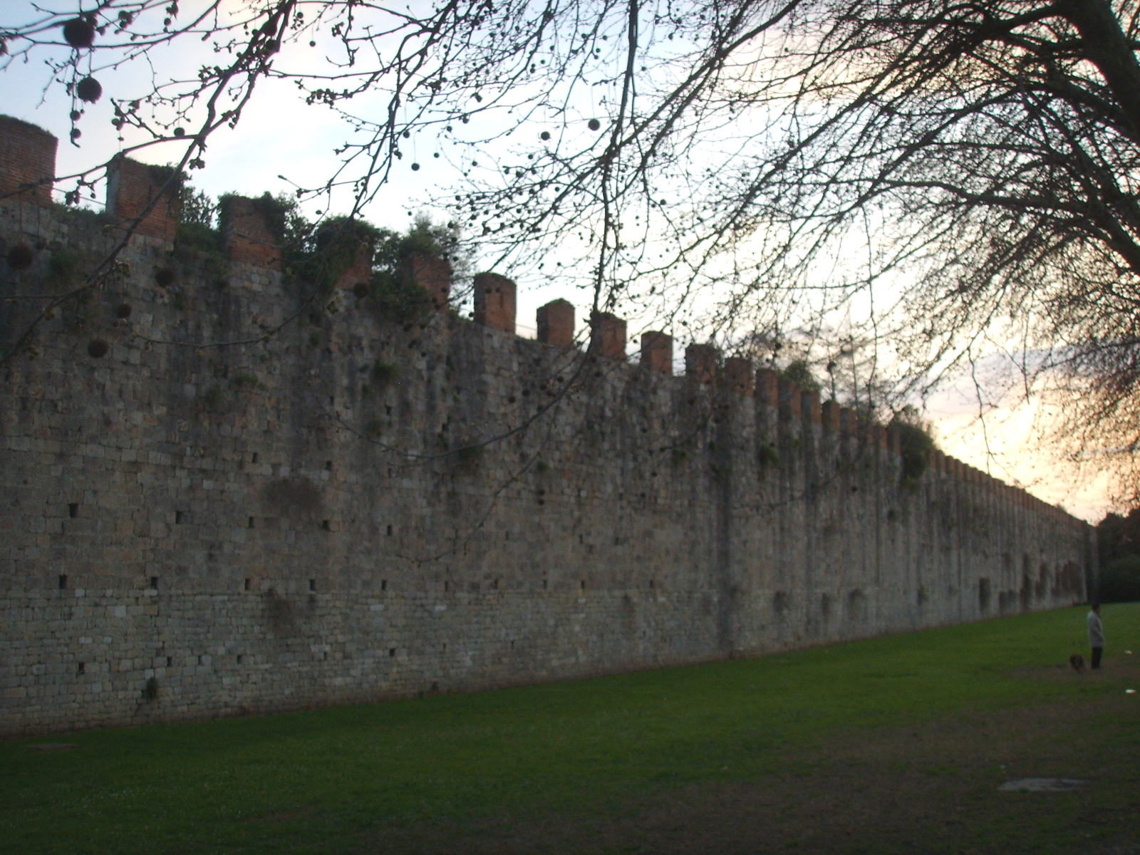 Mura_di_pisa